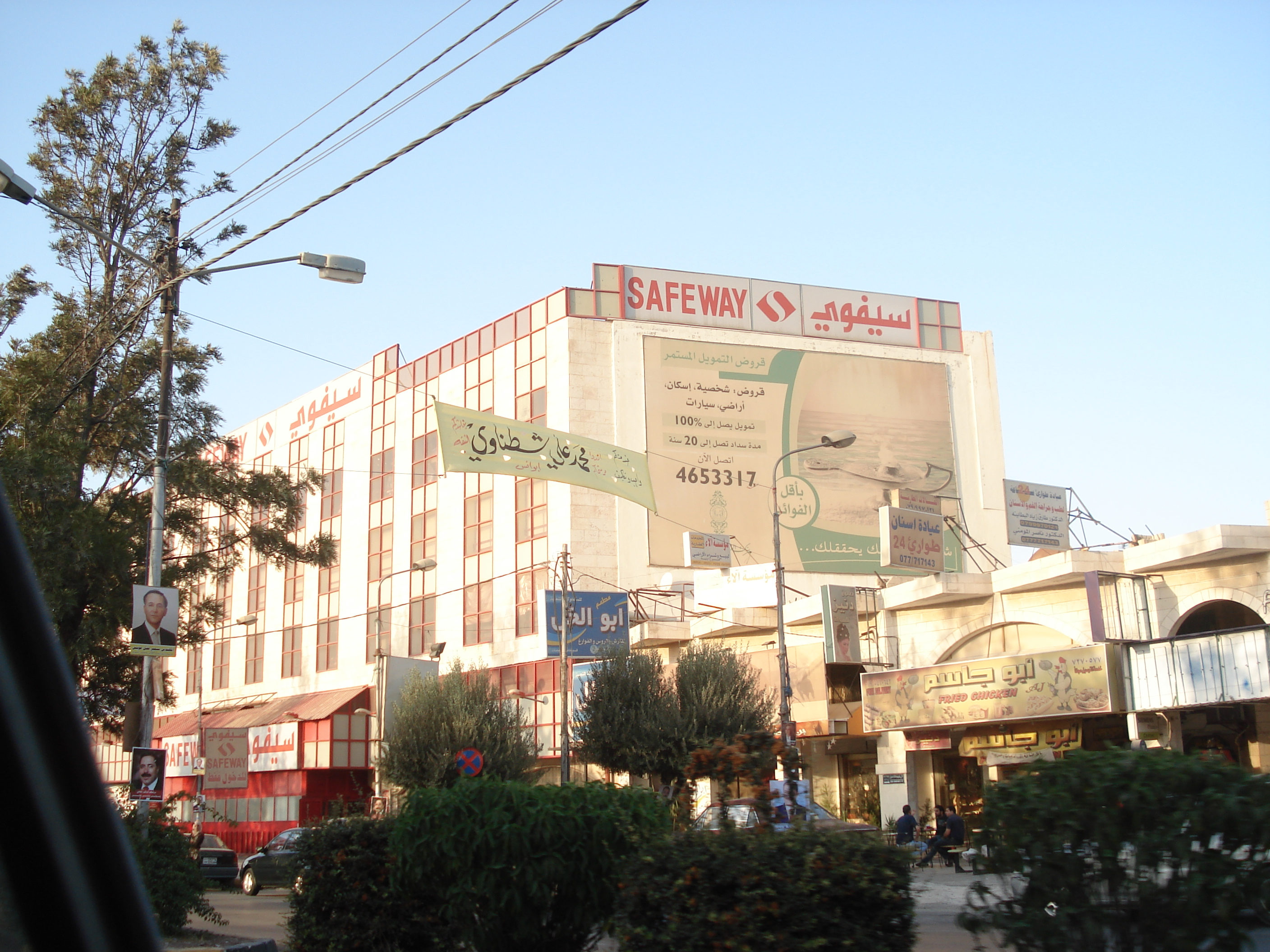 صورة للمجمع التجاري سيفوي وما حوله